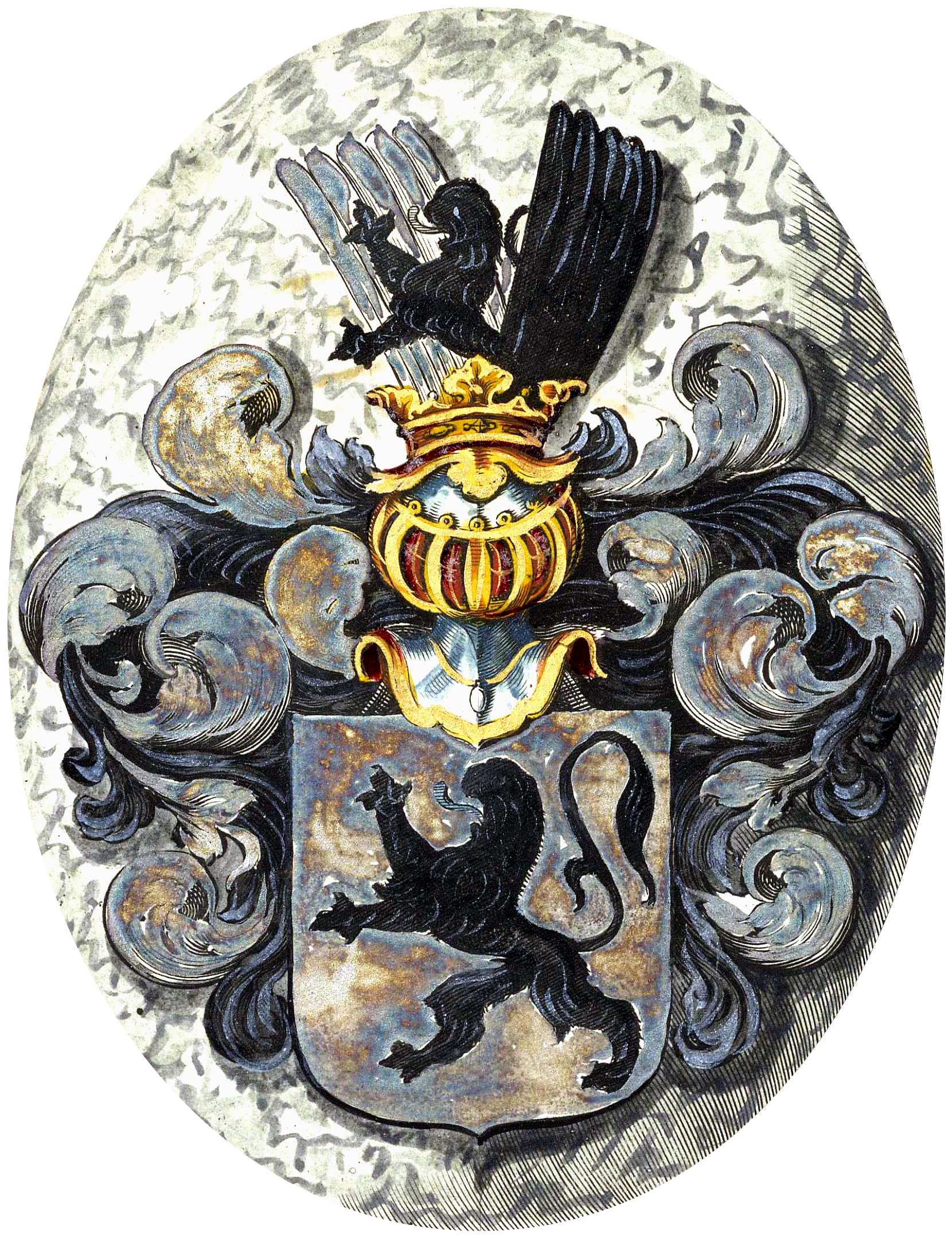 Wapenschild van Amelis van den Bouckhorst / van der Bouchorst († 1669), zoon van Nicolaes van den Bouchorst